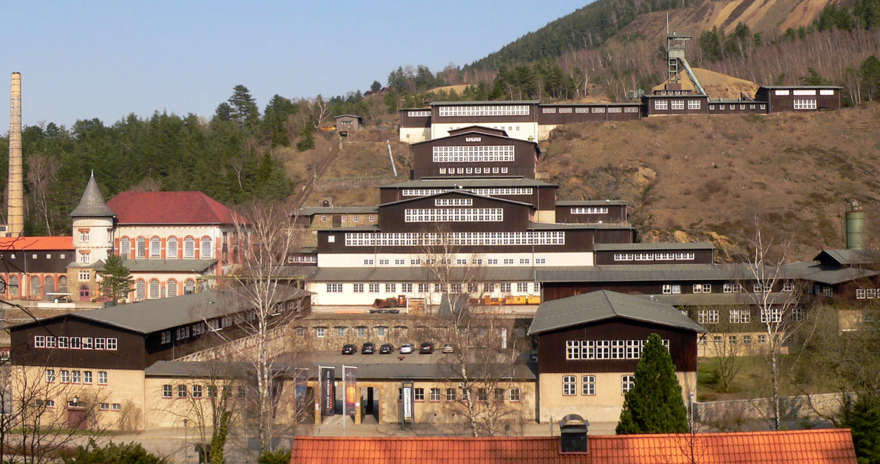 Schupp/Kremmer: Tagesanlagen des Erzbergwerkes Rammelsberg, entworfen und gebaut 1936. Goslar, Niedersachsen, Deutschland.